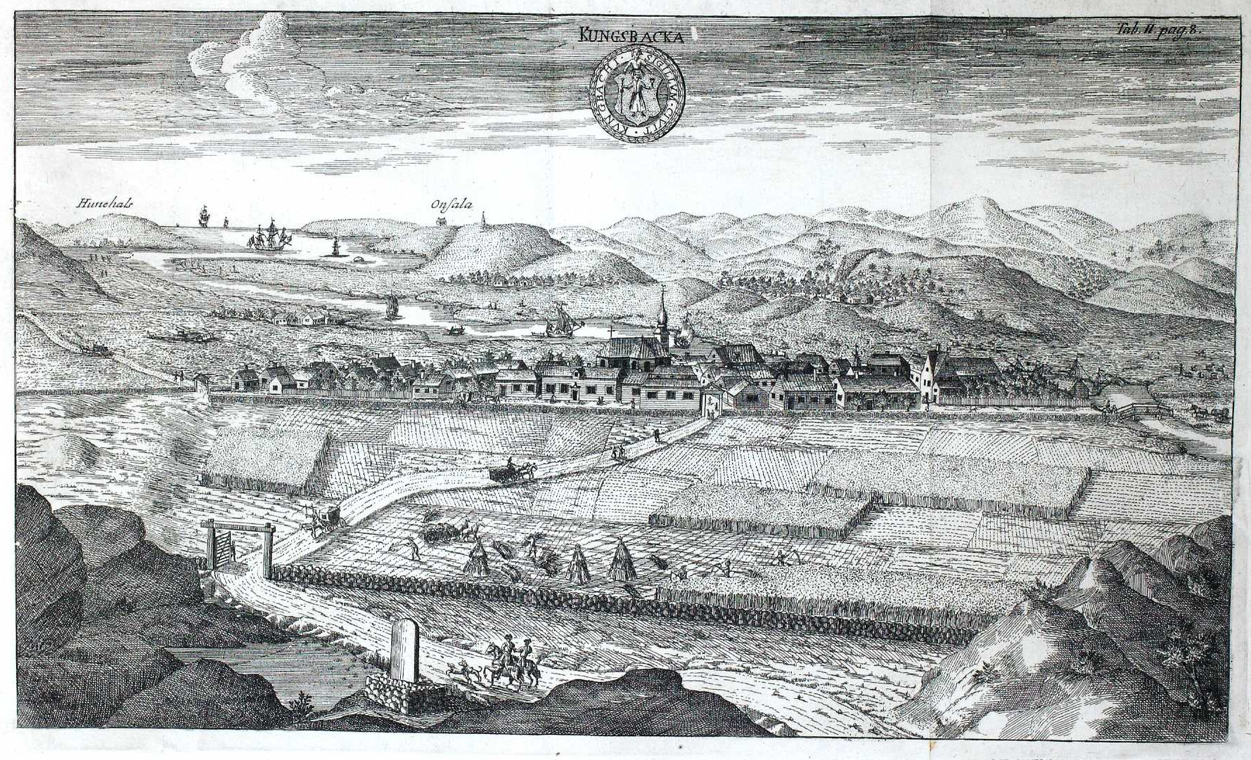 Kungsbacka Hallandia antiqua et hodierna 1752